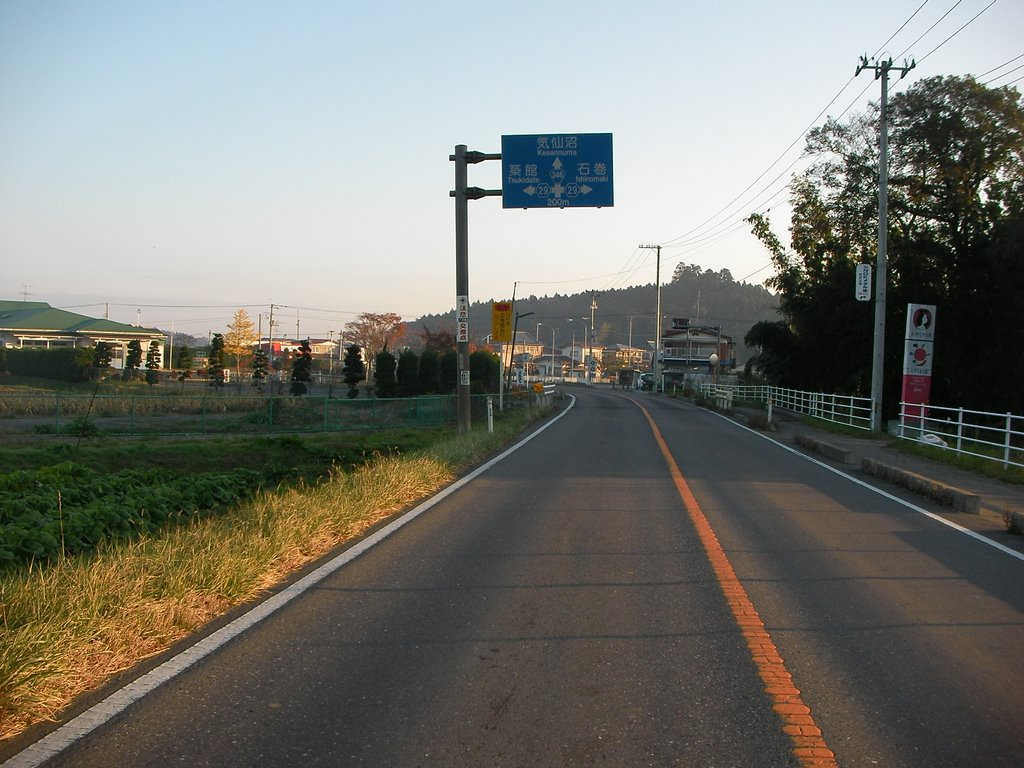 小里（旧・箟岳村）